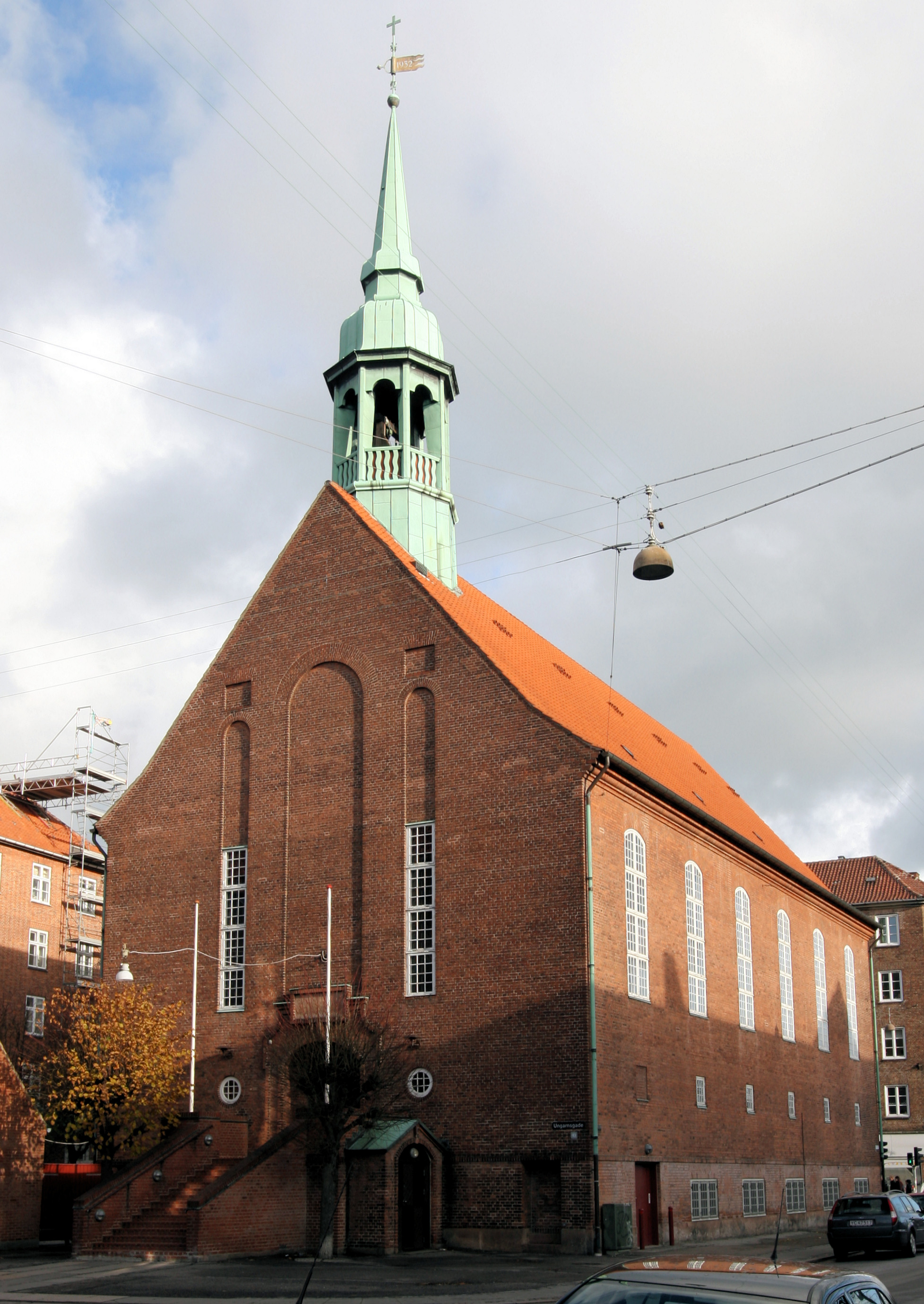 Allehelgens Kirke, Copenhagen, Denmark.